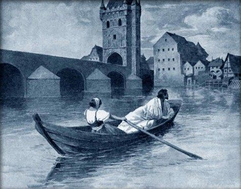 Věnceslav Černý (1865-1936) - Lazebnice převáží krále Václava